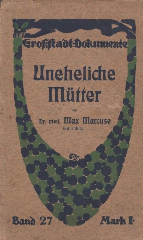 Max Marcuse: Uneheliche Mütter. Berlin: Hermann Seemann Nachfolger, 5. Auflage 1906 Großstadt-Dokumente Band 27, hrsg. von Hans Ostwald